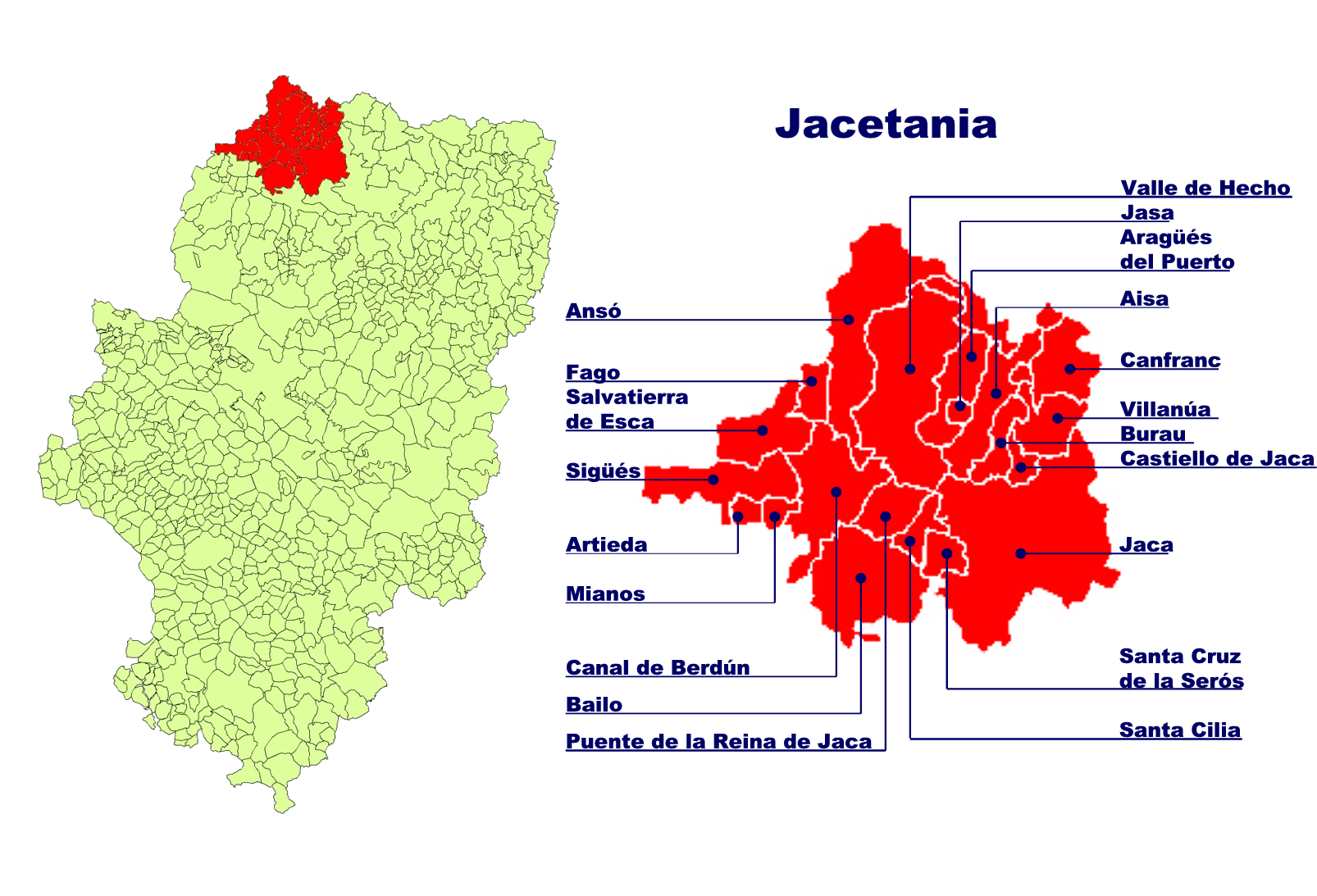 Comarca de la Jacetania Creado el 10.07.2005 por Ecelan en base a Image:Aragon municipalities.png